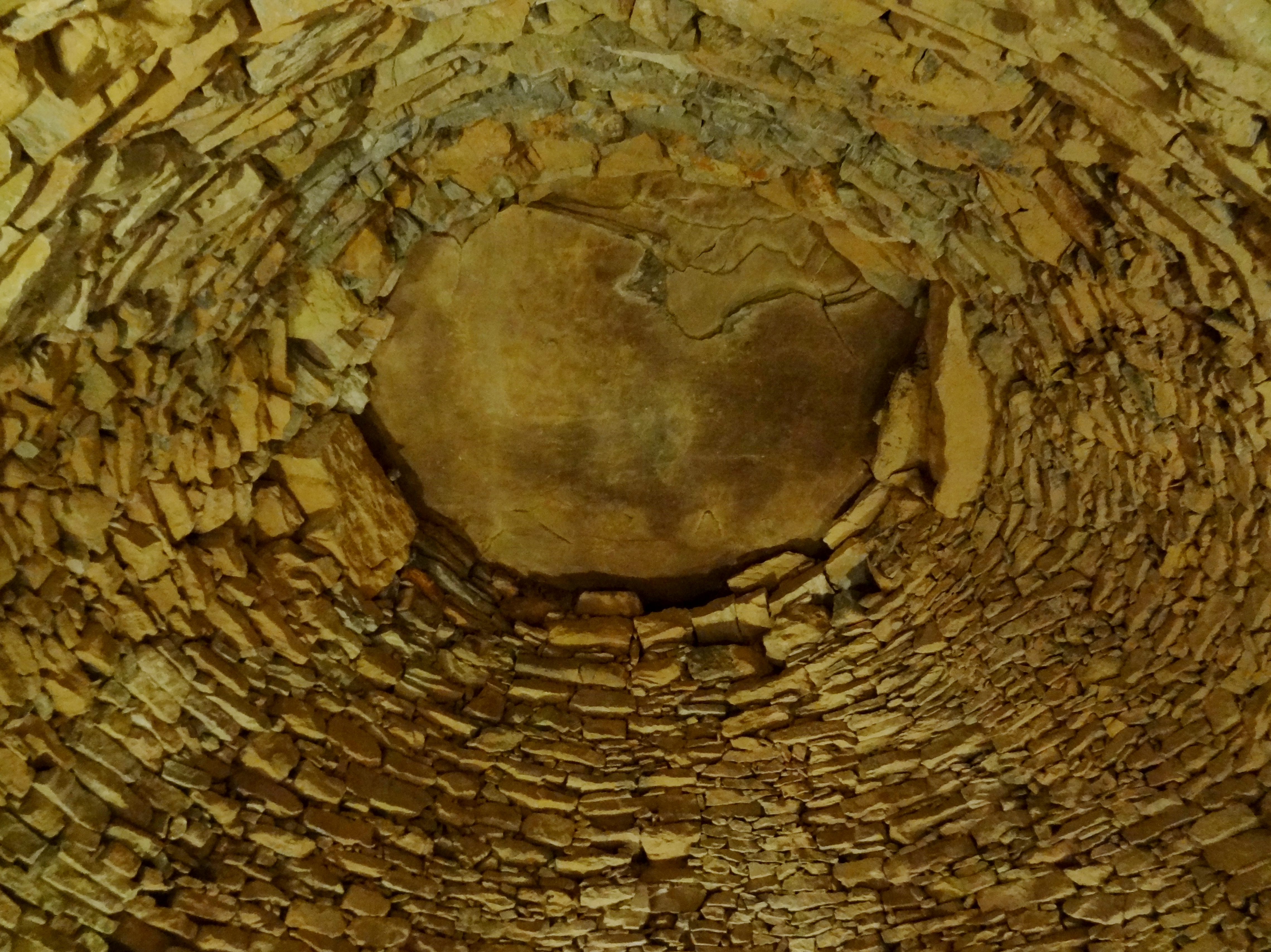 Tholos de El Romeral in Antequera, Provinz Málaga, Spanien